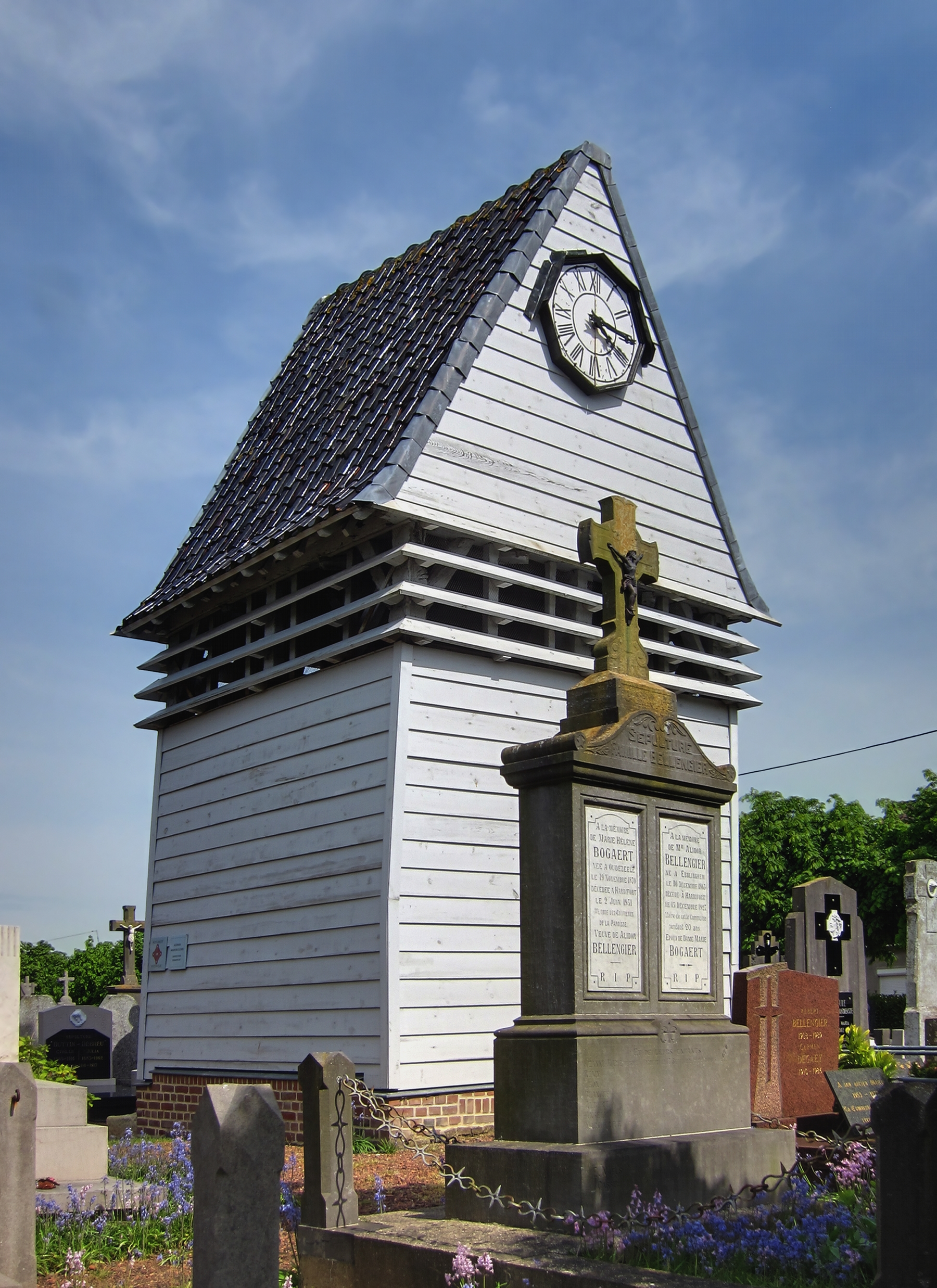 Le klokhuis de l'église d'Hardifort.